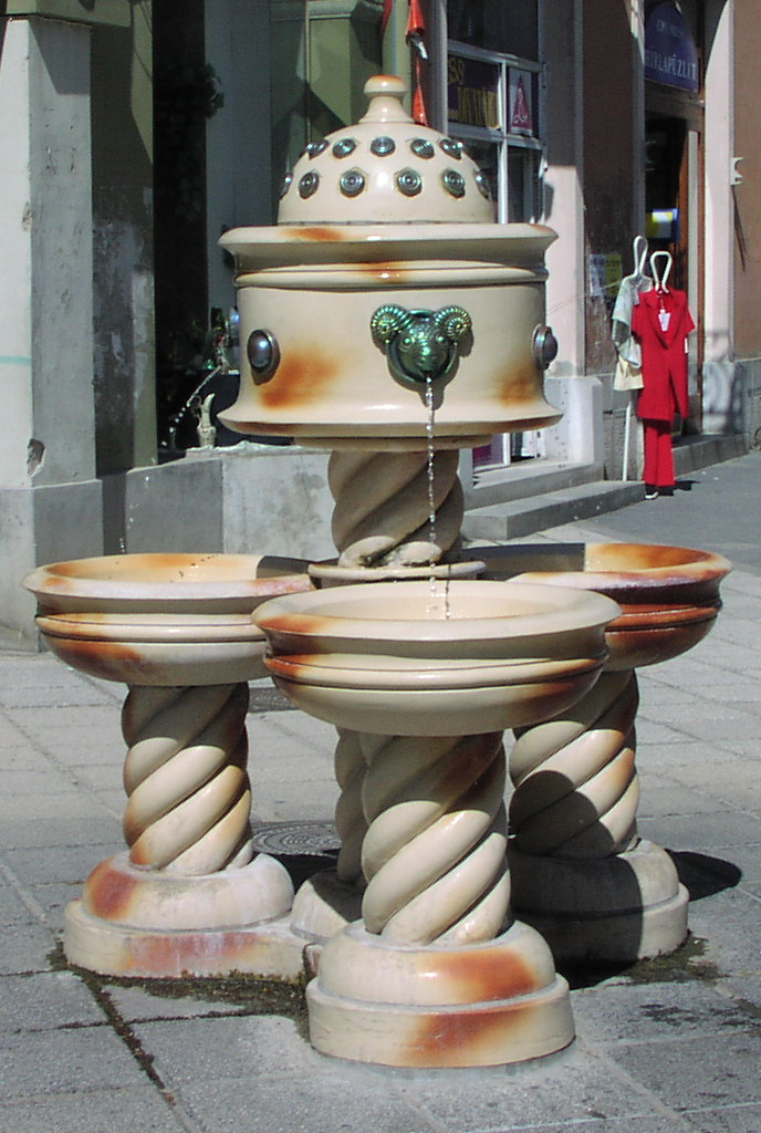 A kaposvári Csokonai-ivókút (egyébb név: Zsolnay-kút) /Felállítás 1988, Fürtös György, 1999. májusában összetörték, rekonstrukció?/ - Somogy megye, Kaposvár, Fő u. 21.